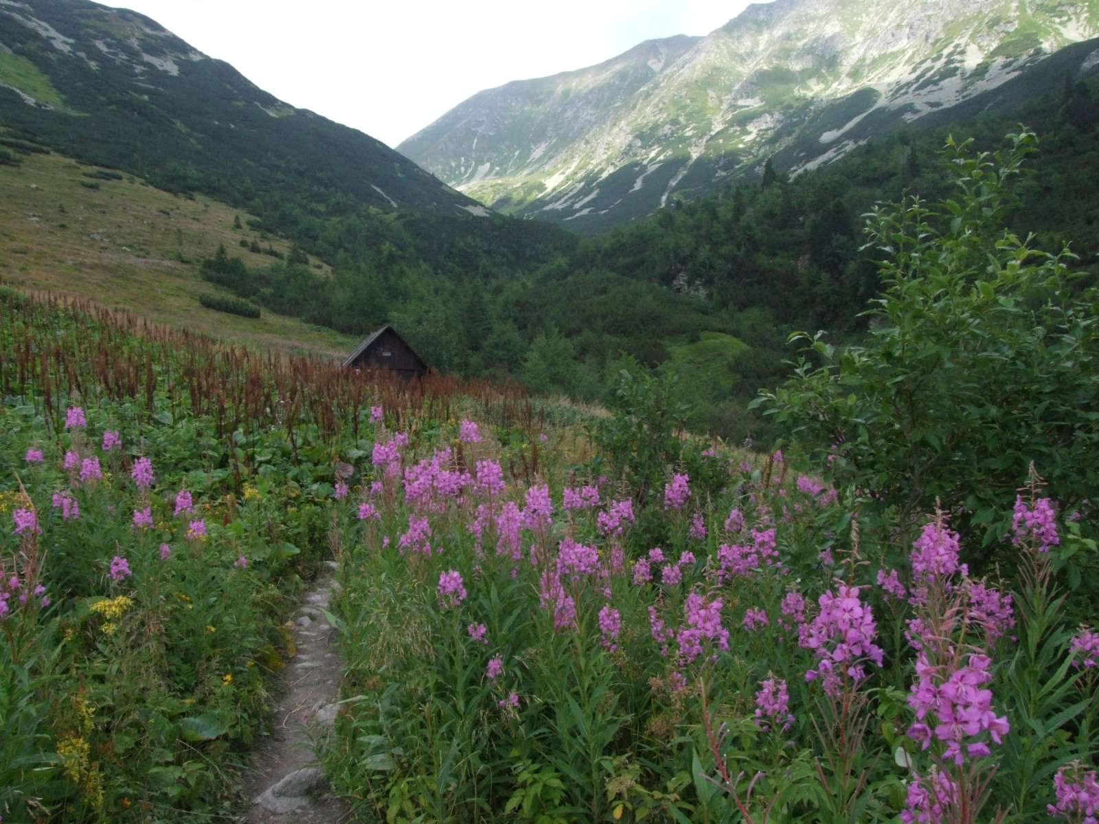 Dolina Gaborowa i Klin (Tatry Zachodnie)